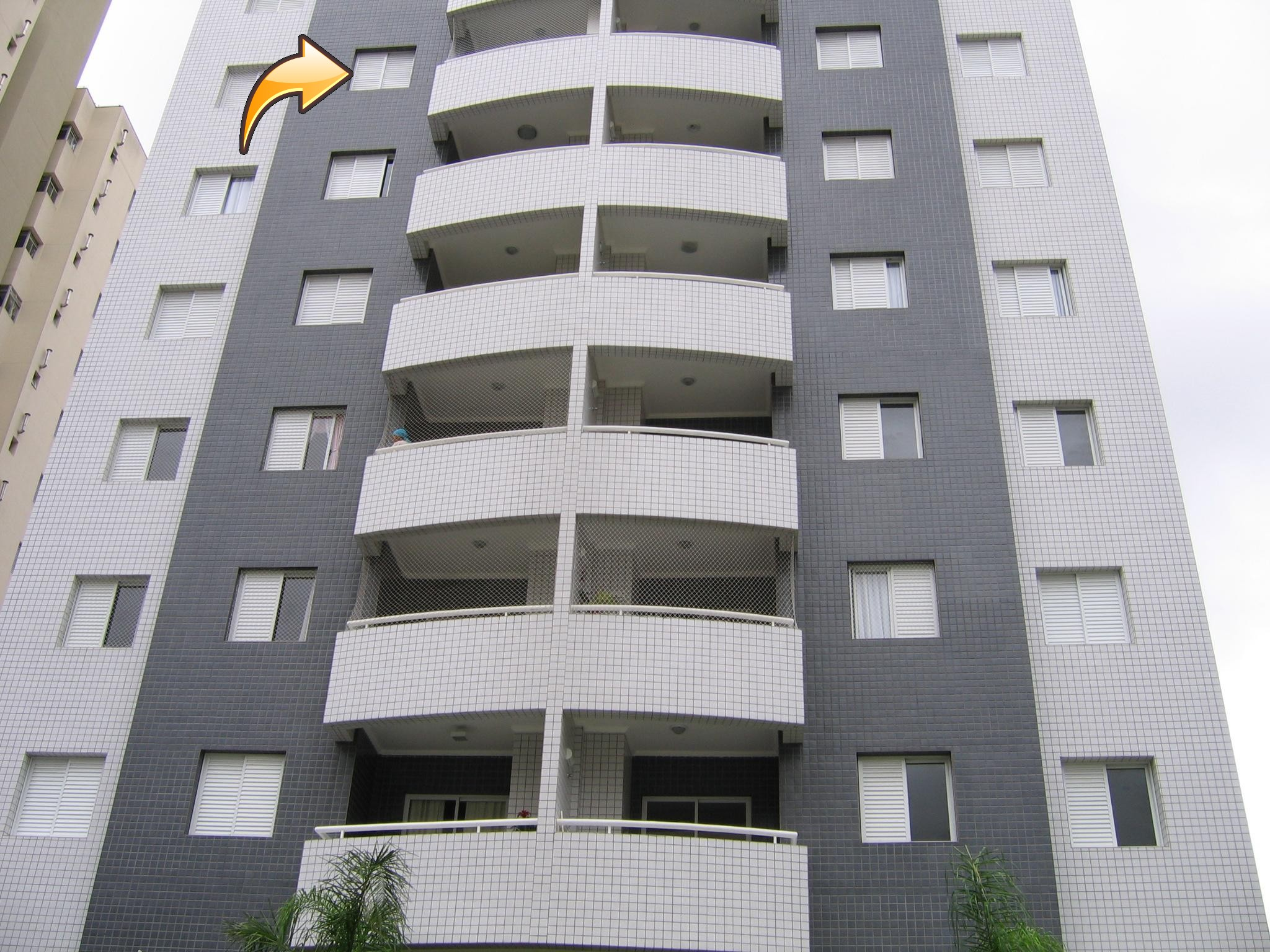 Prédio da rua Santa Leocádia, onde Isabella Nardoni foi lançada pela janela do sexto andar, lado esquerdo